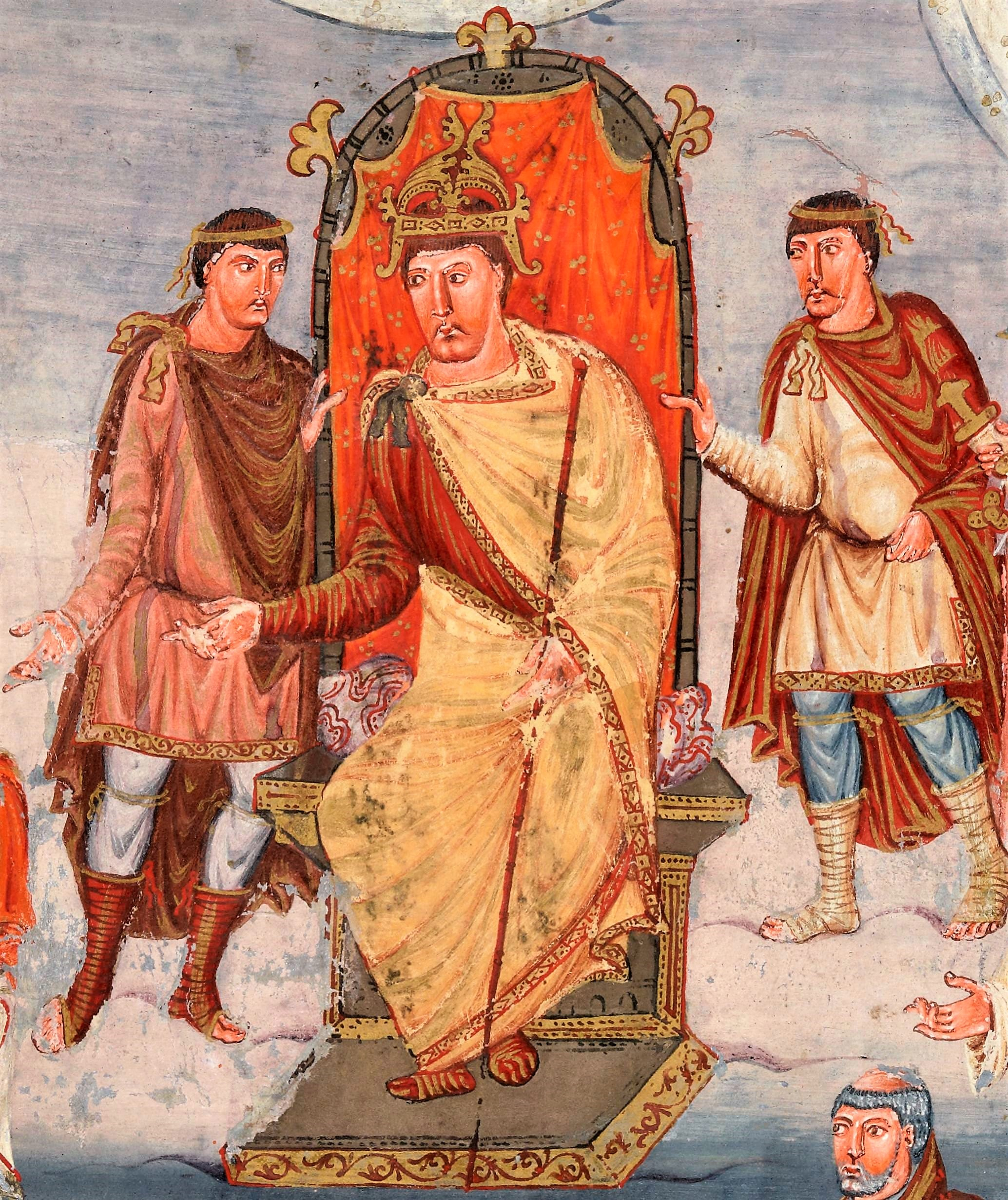 Bibliothèque nationale de France - Bible de Vivien Ms. Latin 1 folio 423r détail Le comte Vivien offre le manuscrit de la Bible faite à l'abbaye de Saint-Martin de Tours à Charles le Chauve